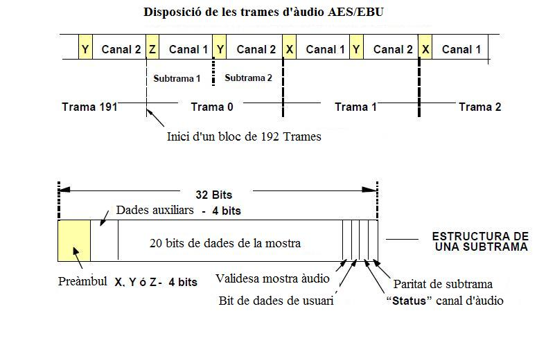 Tramas_audio